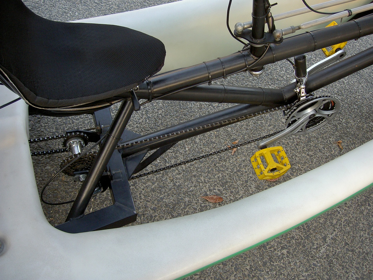 VELOTAXI derailleur